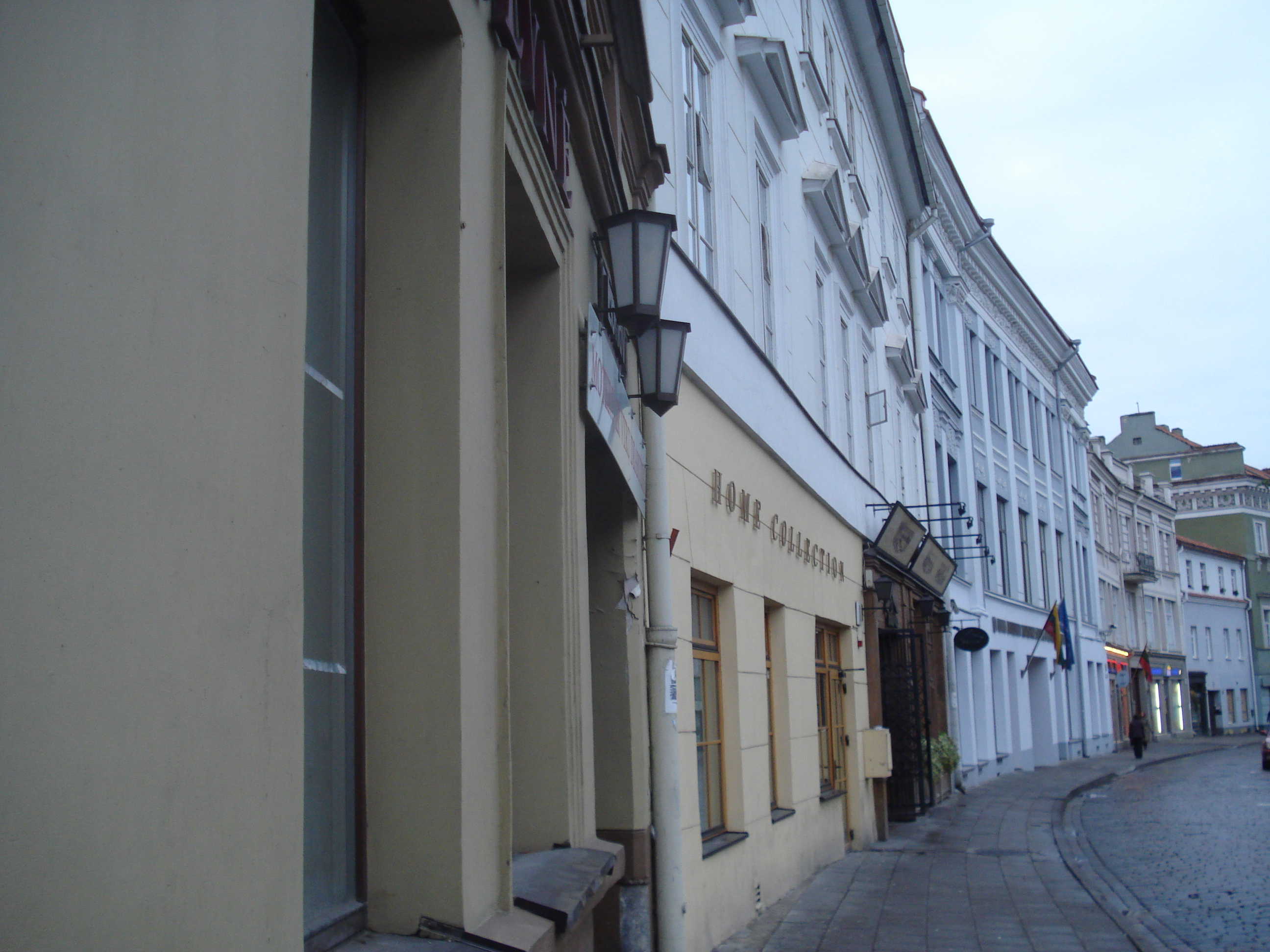 Vokiečių street in Vilnius (Vokiečių g. 6, 8, 10, 12, 14)